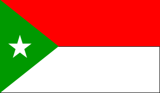 Bandera del municipio Trujillo, estado Trujillo, Venezuela